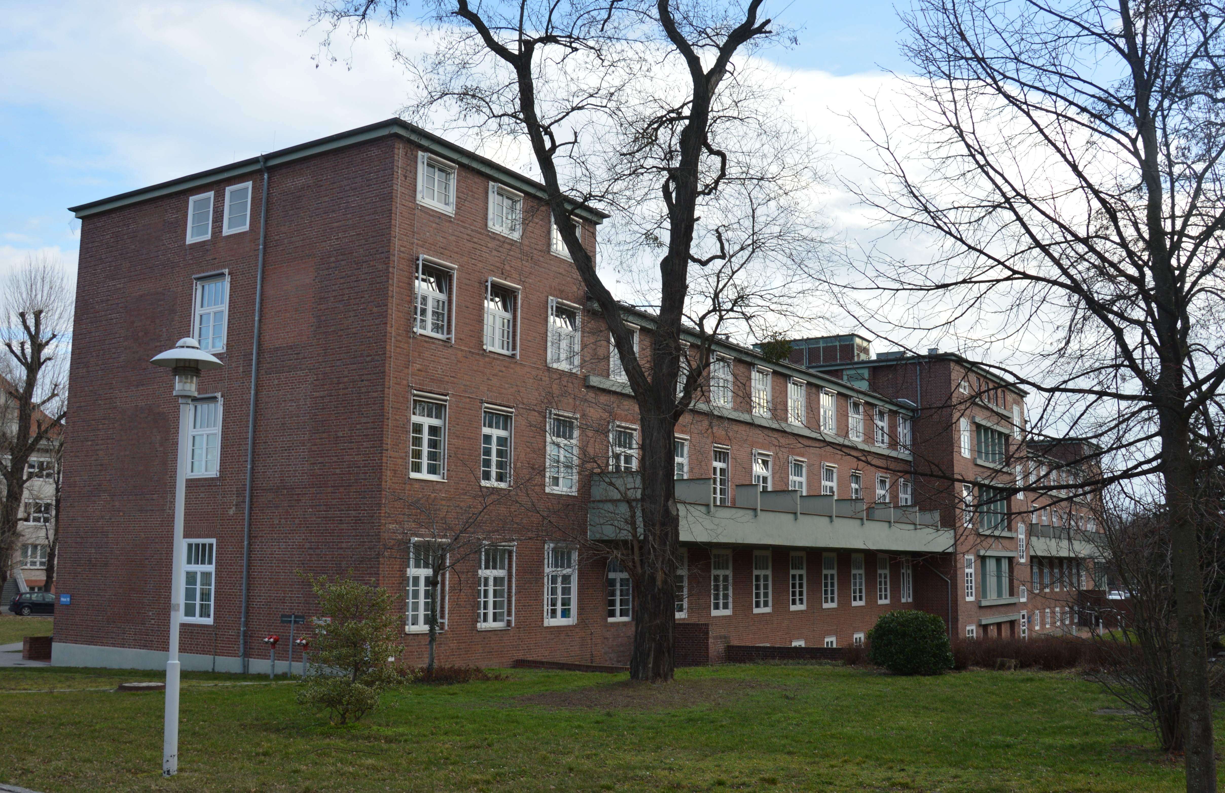 Uniklinikum Magdeburg Gebäude 10